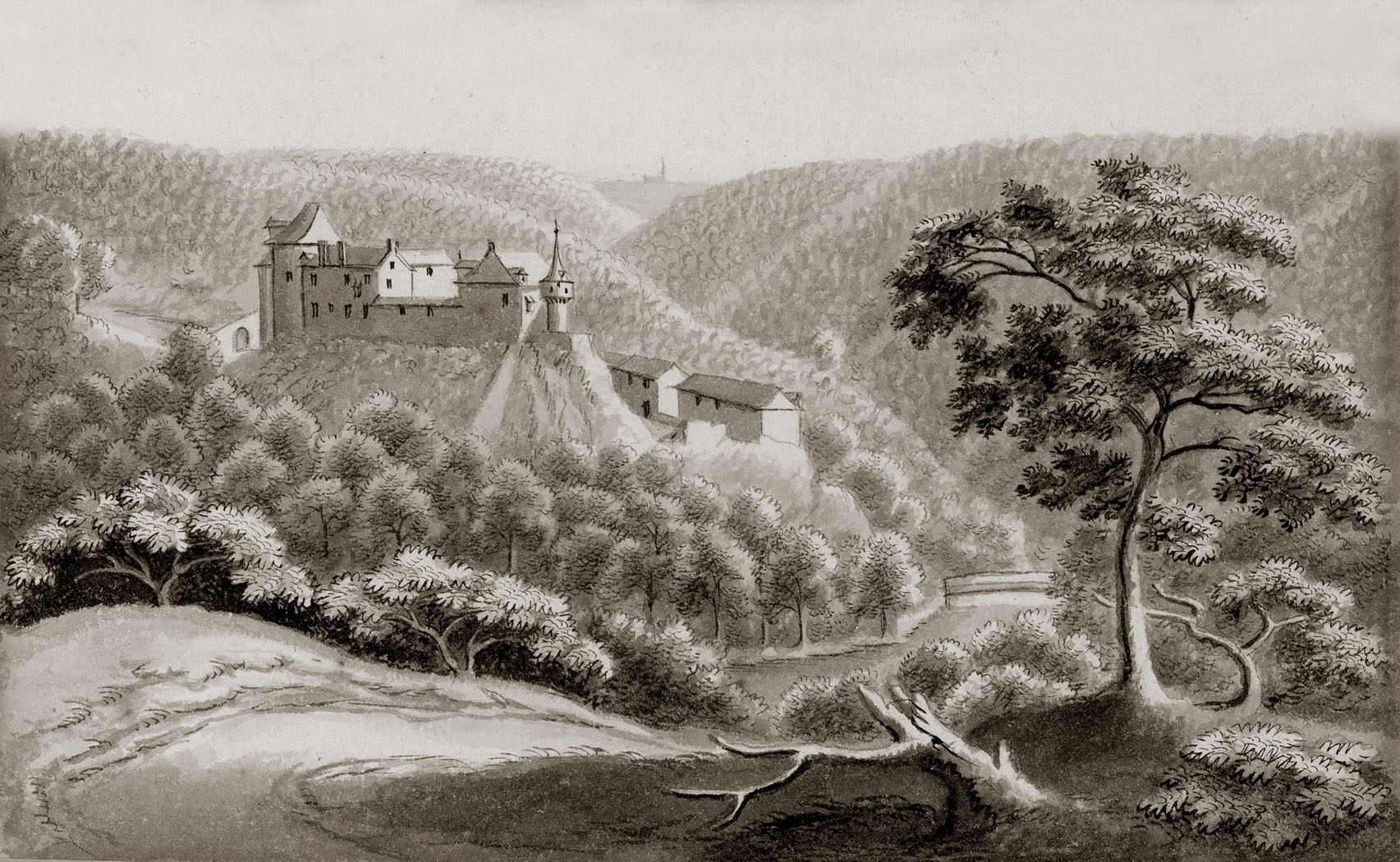 Le château de Reinhardstein (vu depuis le flan sud de la vallée de la Warche) (17,4x10,8 cm), Mathieu-Antoine Xhrouet, 1738